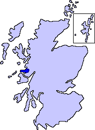 Историческая область Арднамурхан, Шотландия Примерные границы исторической области Арднамурхан, Шотландия